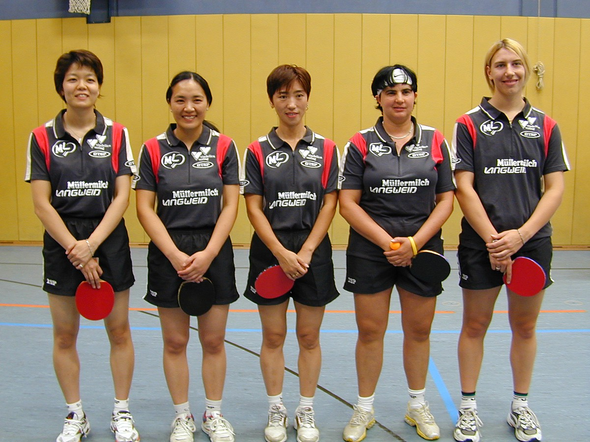 Das Team von Müllermilch Langweid in der Saison 2005/2006: Aya Umemura, Ding Yaping, Yunli Schreiner, Csilla Batorfi, Katharina Schneider